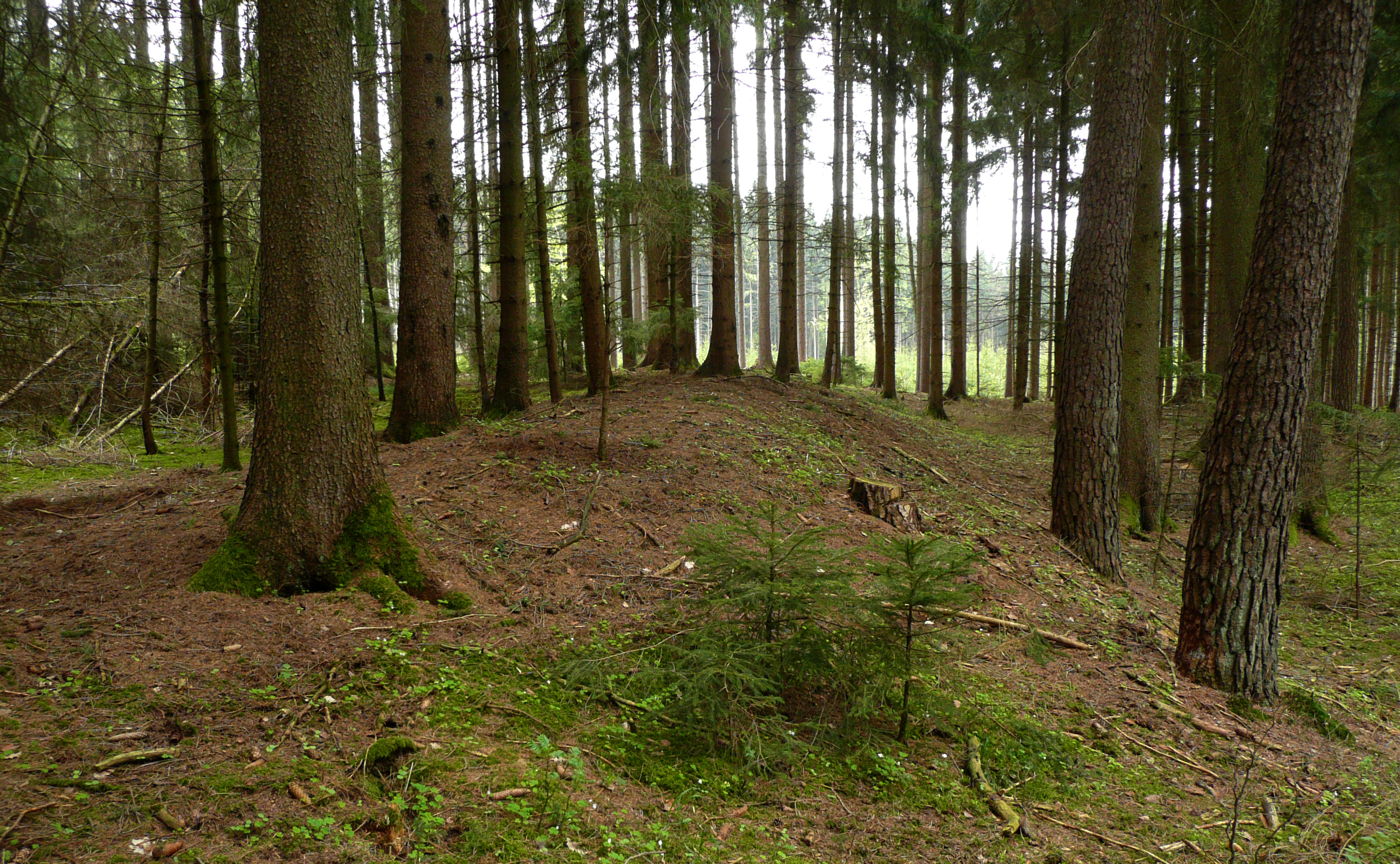 Keltische Viereckschanze bei Möckenlohe, westliche Seite, Ansicht von N.